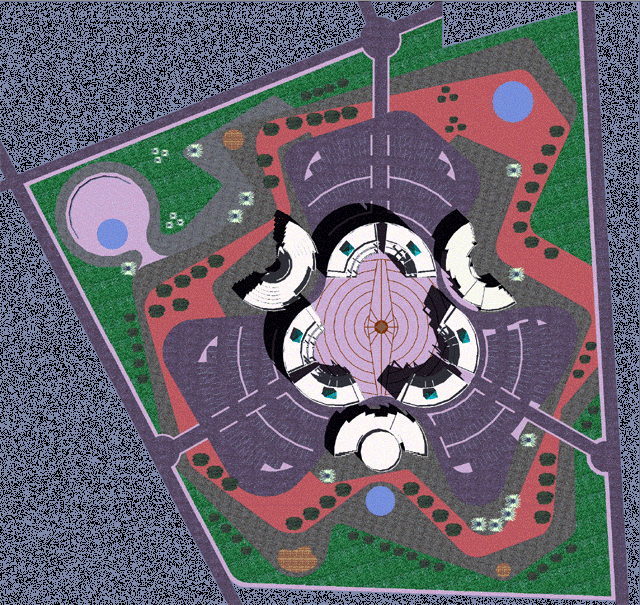 Esempio di una Planivolumetria Tesi di laurea in Progettazione urbana Riqualificazione urbana area periferica a maglie (Lecce) Relatore: Prof.Arch P.Portoghes Laureanda: Nadia Coluccia